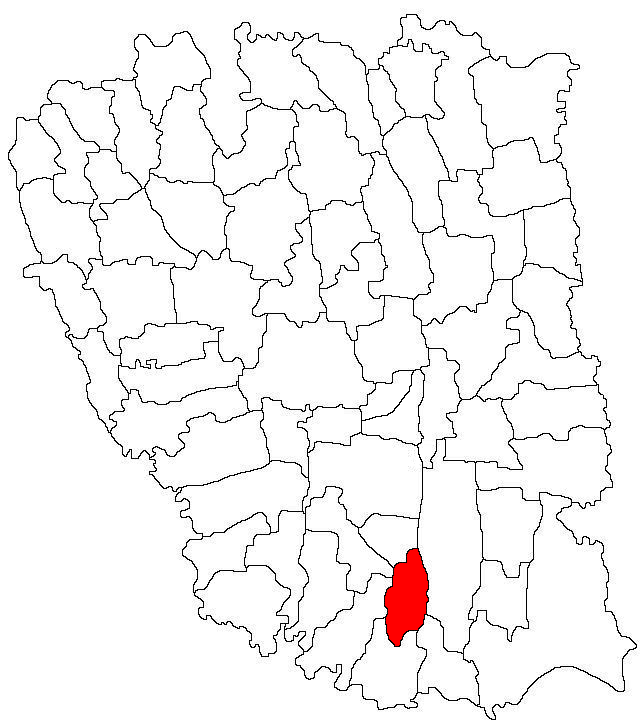 Categorie:Hărţi ale judeţului Galaţi